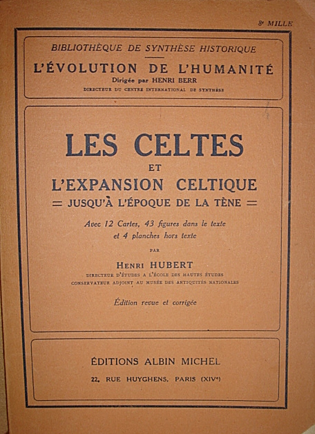 Couverture du livre de Henri Hubert et Marcel Mauss, Les Celtes, première édition